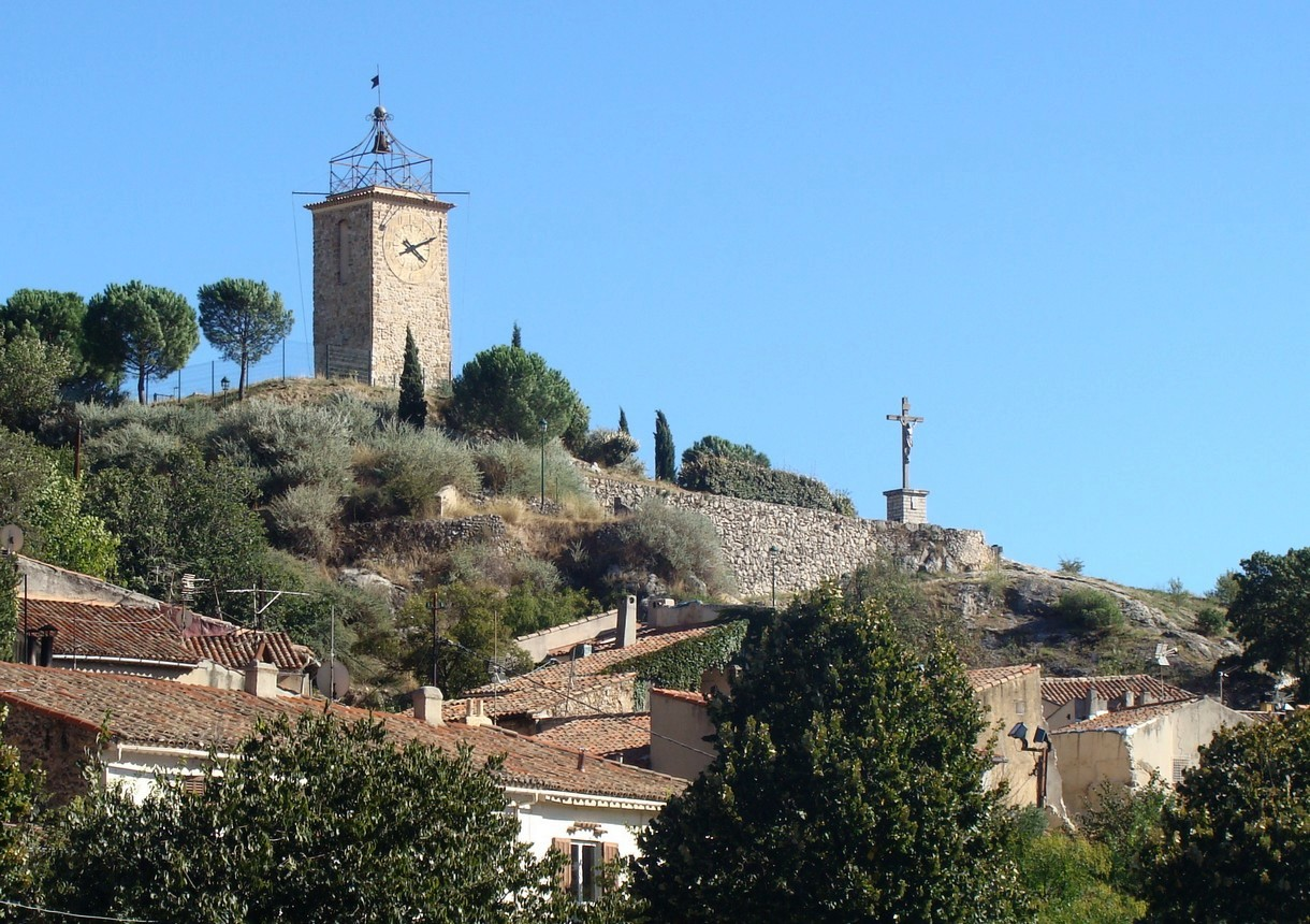 Le Beffroi de Roquevaire et son campanile, dominant les vieilles maison du bourg.